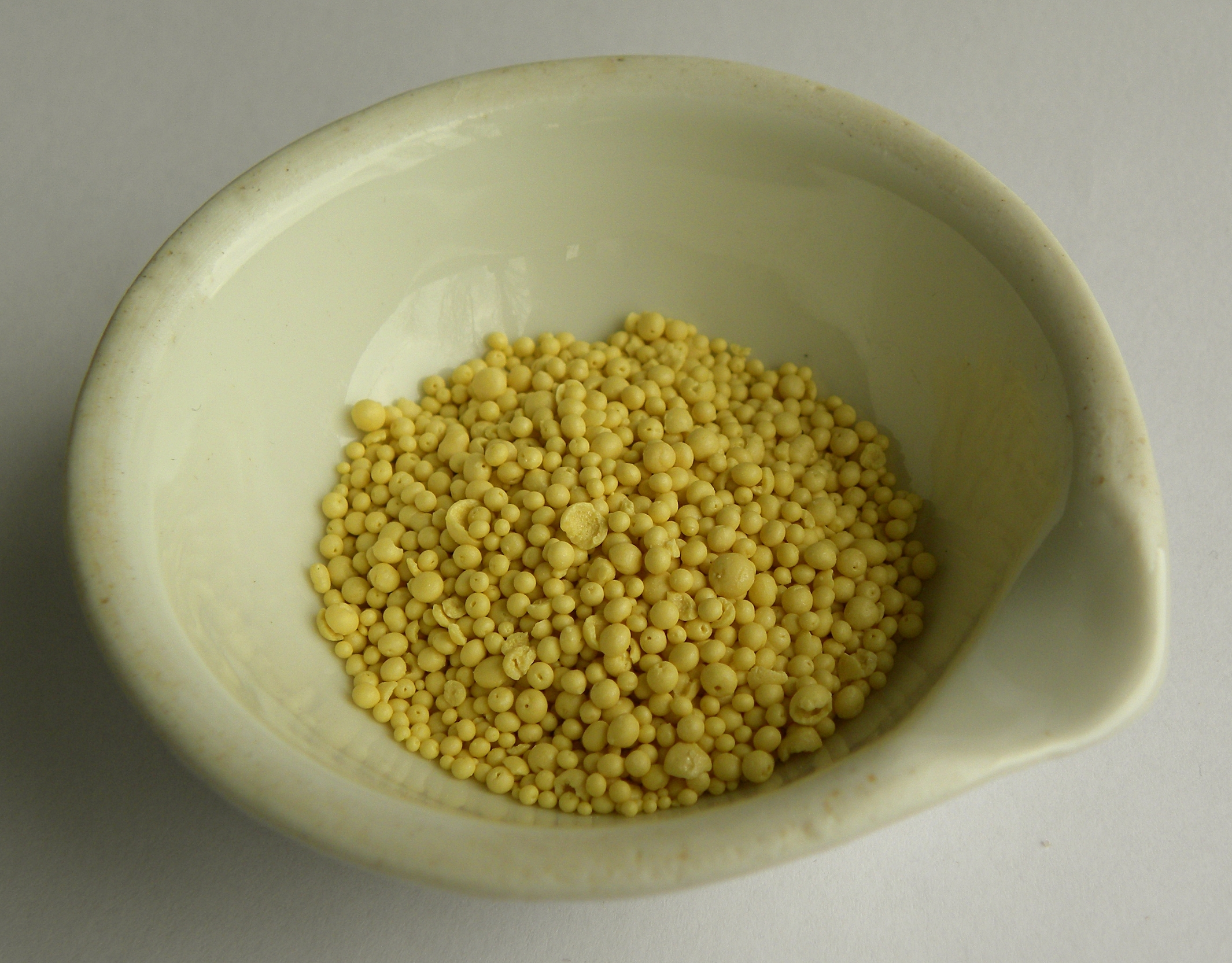 Siarka granulowana